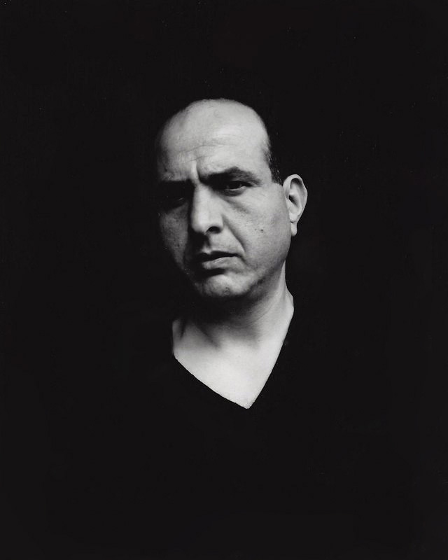 דיוקן של האמן רענן חרל"פ. צילום:גליה גור זאב